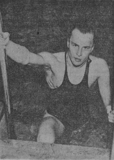 Rune Hellgren